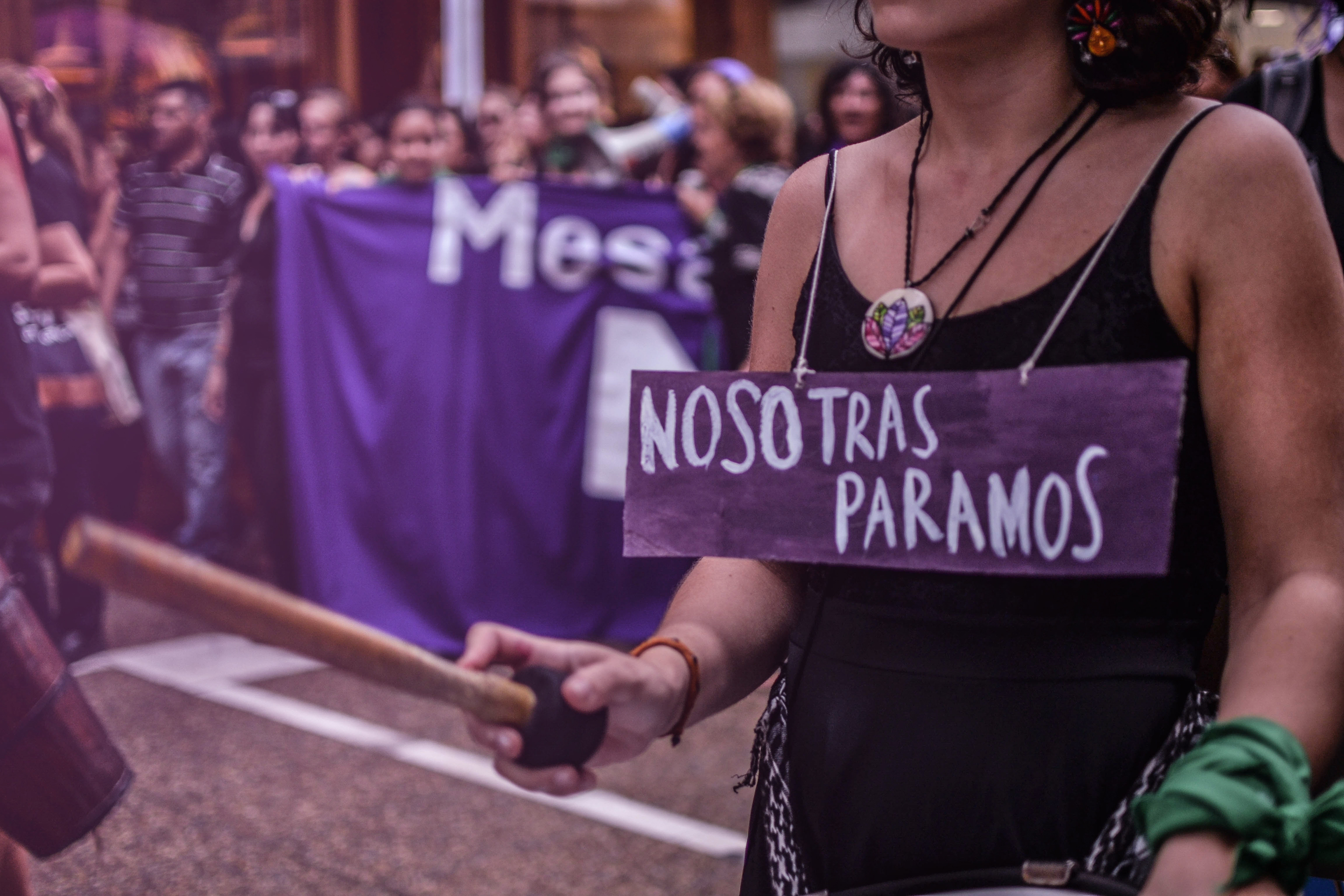 Paro Internacional de Mujeres en Santa Fe 2017 - Nosotras Paramos - 8M